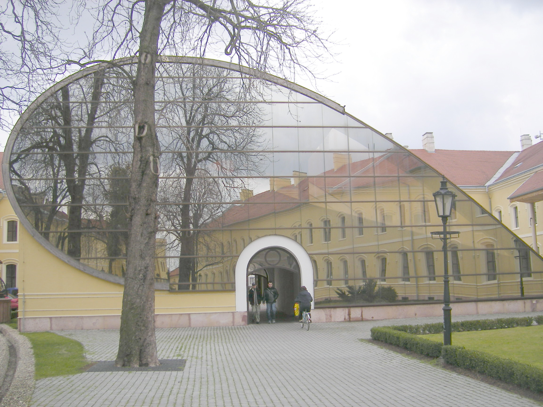 Komárom - A Selye János Egyetem a Tiszti Pavilonban